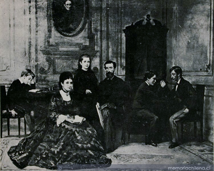 Reproducción en blanco y negro del cuadro que retrata la familia del millonario político chileno Maximiano Errázuriz, pintado en París en 1871 por el artista francés Maurice Blum. De izquierda a derecha: Rafael, futuro politico y diplomático; Carmen Valdés, flamante segunda esposa de Maximiano que morirá a su regreso a Chile después de contraer la fiebre amarilla a su paso por el Caribe; Amalia, futura esposa del pintor y diplomático Ramón Subercaseaux, Maximiano, Guillermo y José Tomás, futuro diplomático y pintor. El cuadro en la pared del fondo representa a la madre de Maximiano, Rosario Valdivieso Zañartu.